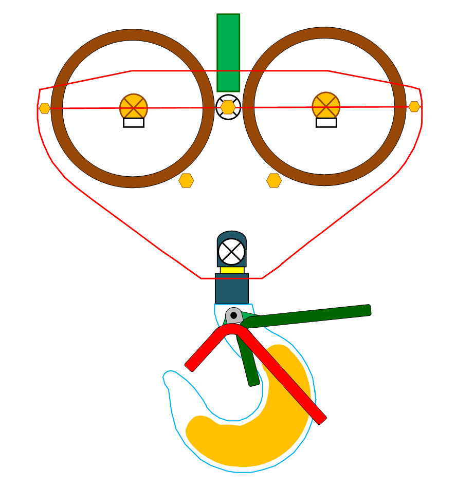 Крюковая подвеска крана КБ-403